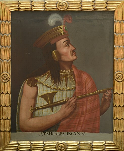 Portrait d'Atahualpa Inca XIV, (c. 1502 – August 26, 1533 Quito, Ecuador), dernier empereur de Tahuantinsuyu, ou EmpireInca. Pièce de l'exposition L'Inca et le Conquistador, Musée du Quai Branly, 2015.